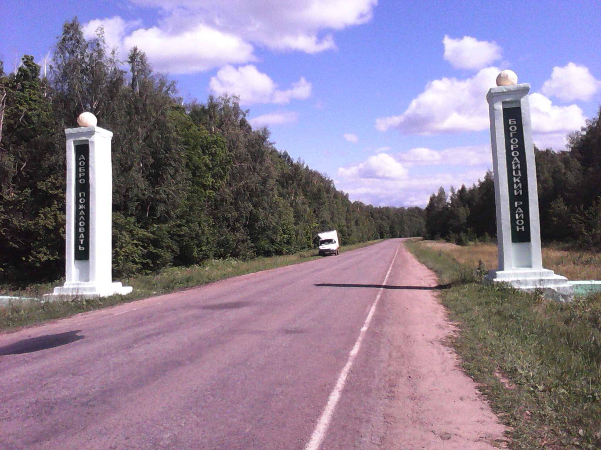 Стела при въезде в Богородицк